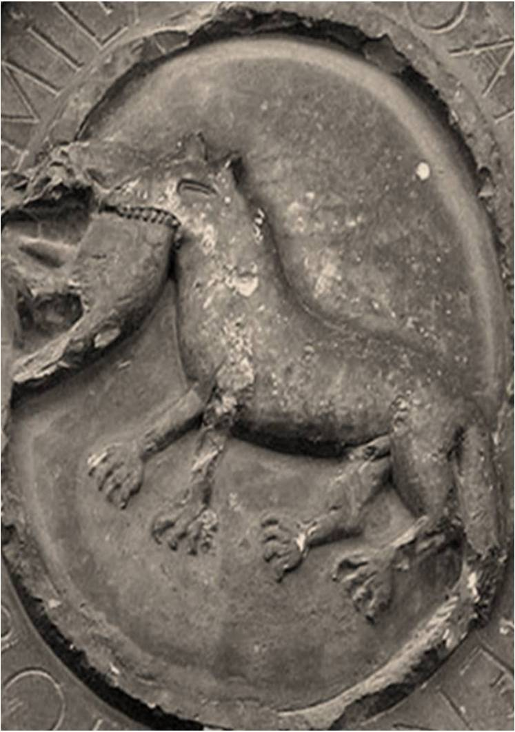 Zaraitzuko etxe bateko armarria